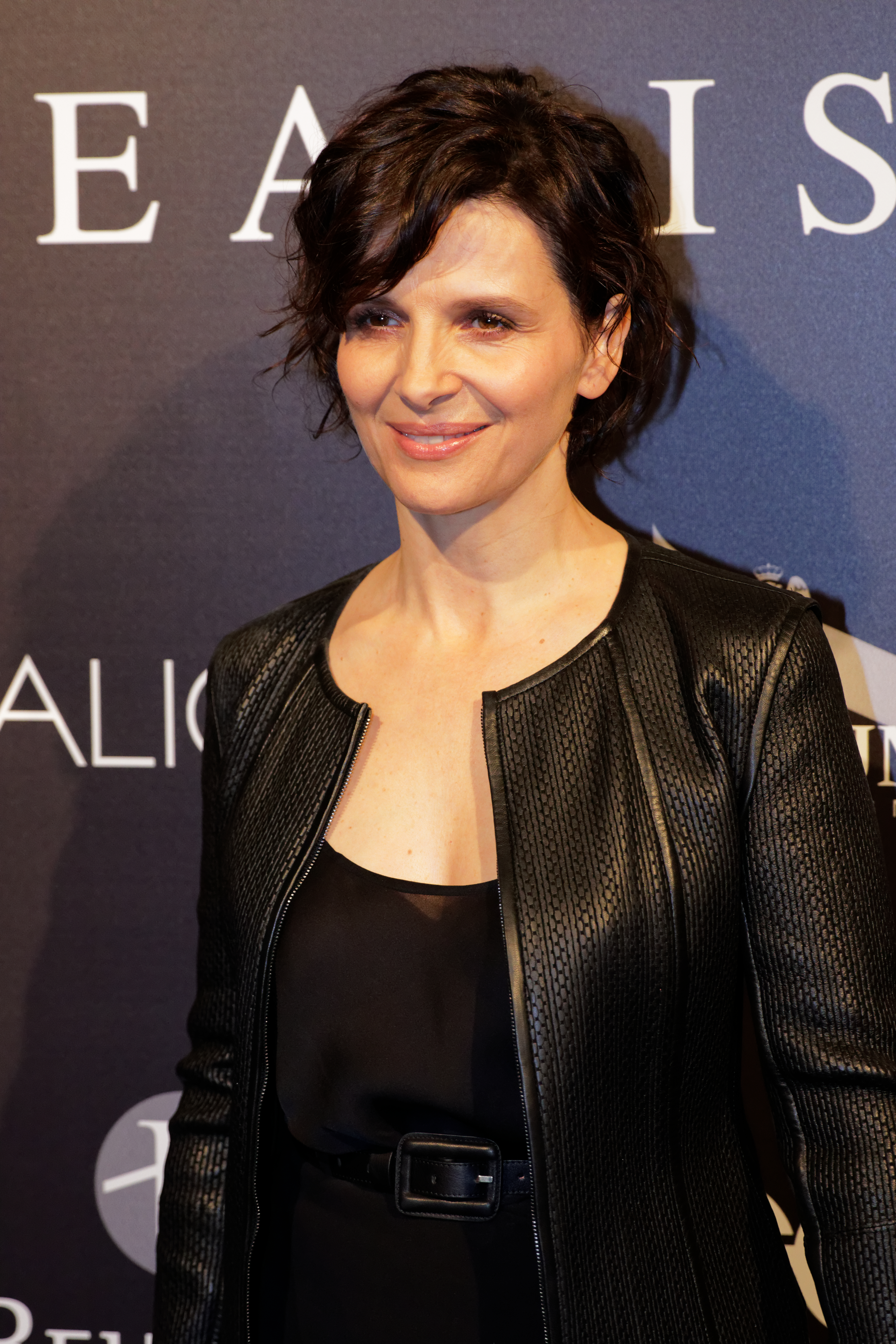 Photocall du festival automobile international 2016.